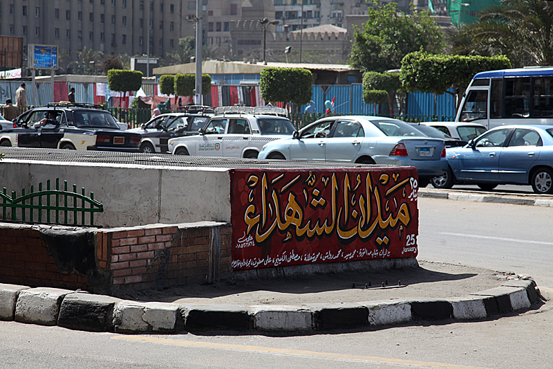 Nachrevolutionärer Tahrir-Platz: U-Bahn-Haltestelle mit der Aufschrift „Midan esch-Schuhada“ (Märtyrerplatz)